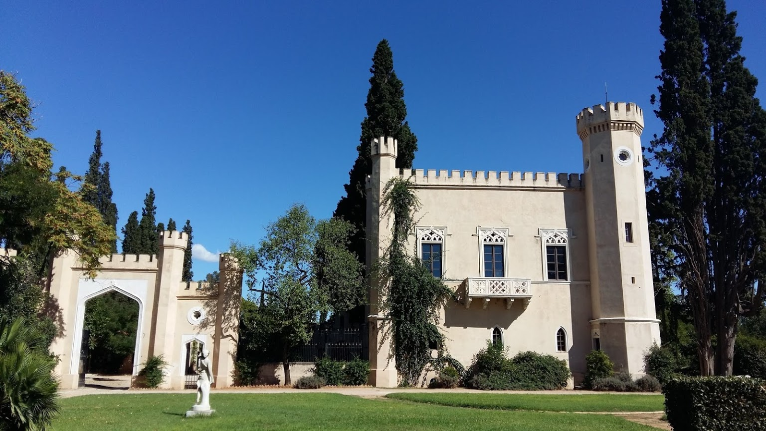 Ο υπαίθριος χώρου του Πύργου Βασιλίσσης.